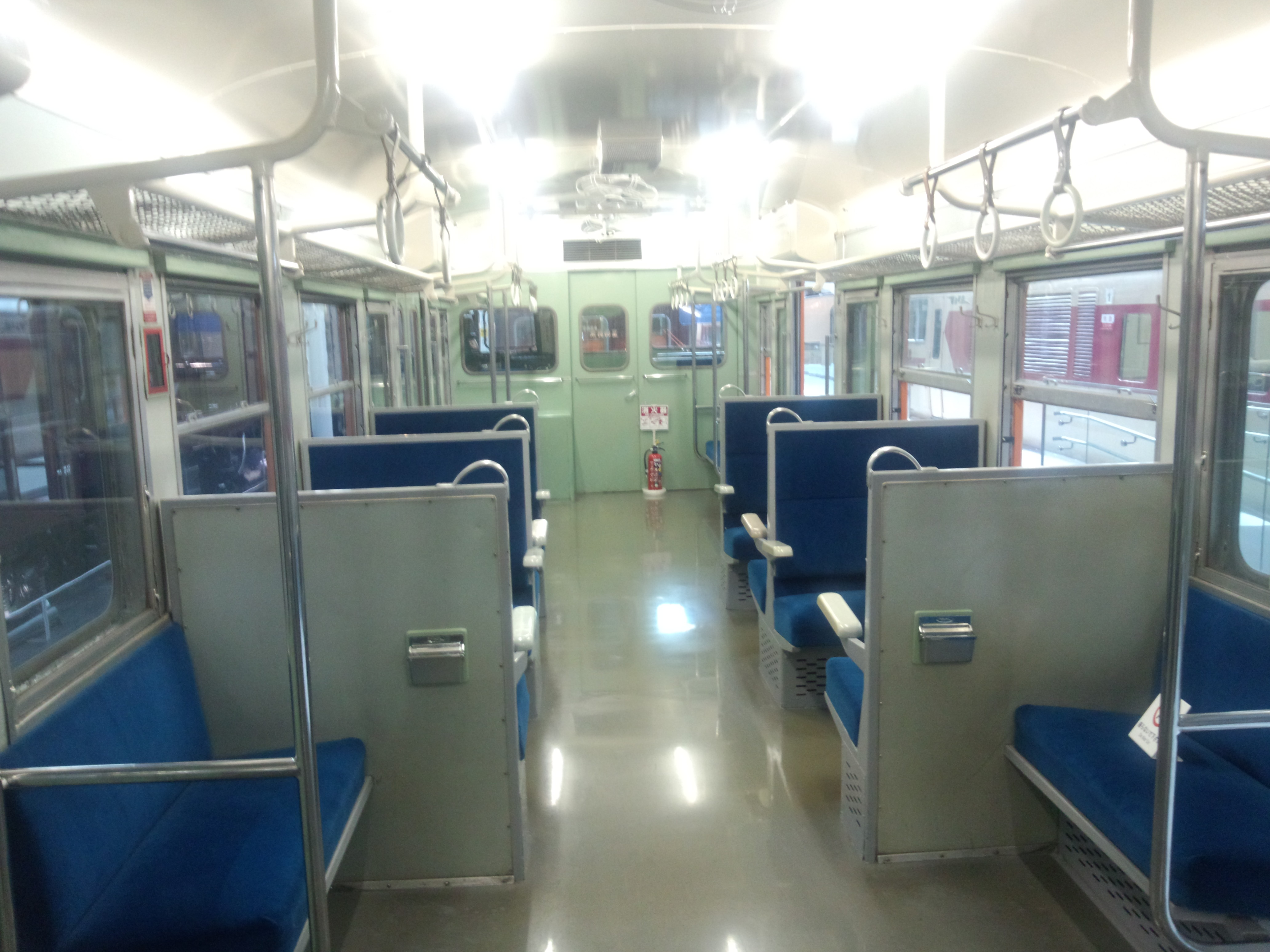 リニア・鉄道館に保存されているクハ111-1車内。灰皿が置かれている所が時代の違いを物語る、